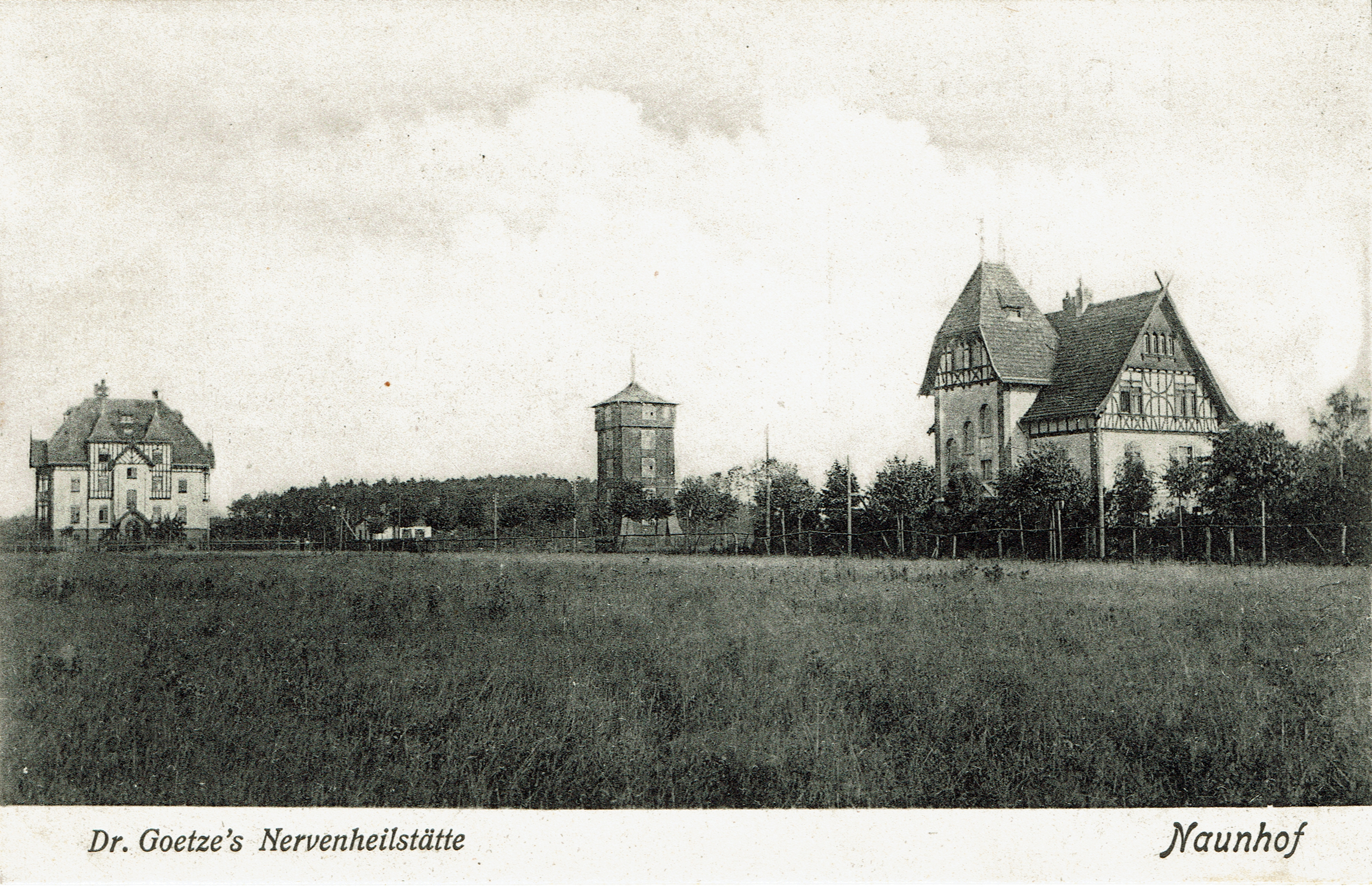 Dr. Goetzes Naturheilstätte in Naunhof (Postkarte, um 1908)